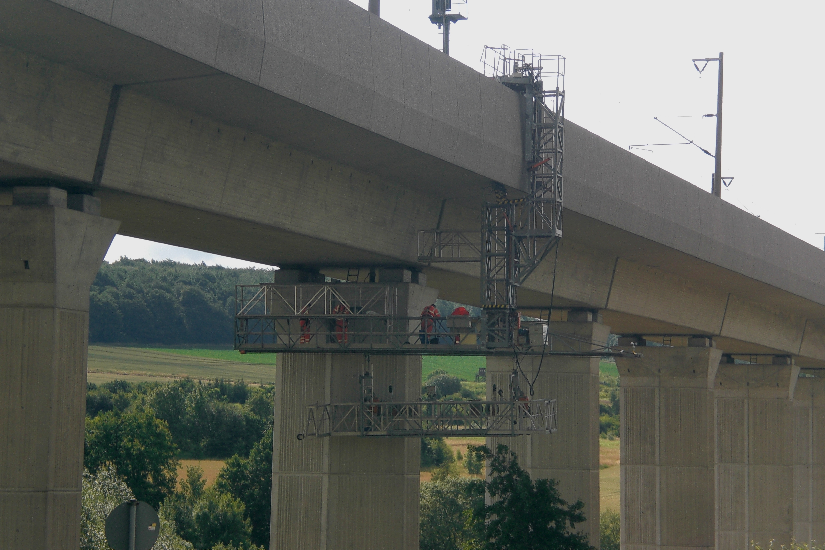 Brückenprüfung im Juli 2009